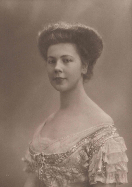 Berta Kolowrat-Krakowská (1890–1982)